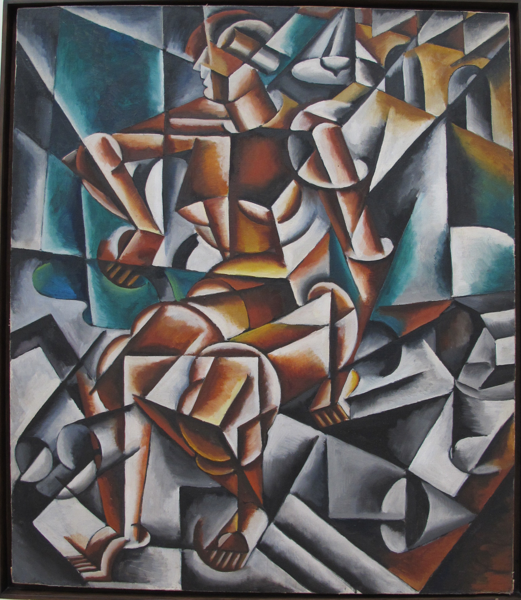 Figura + Casa + Spazio, olio su tela, 125 x 107 cm., Museo di Stato russo, Pietroburgo